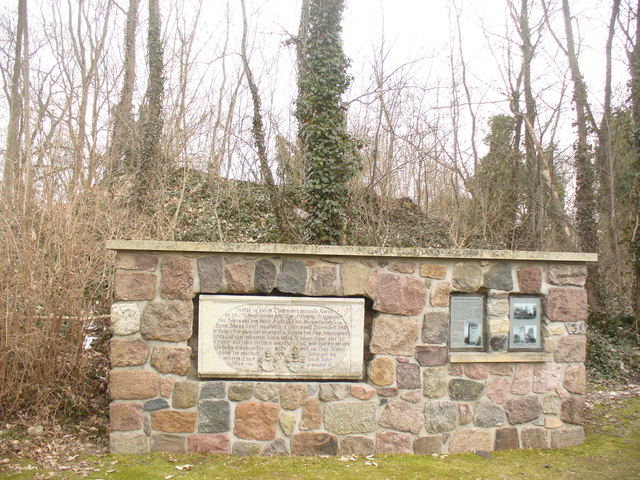 Heinersdorf - Ehemalige Dorfkirche (Former Village Church)